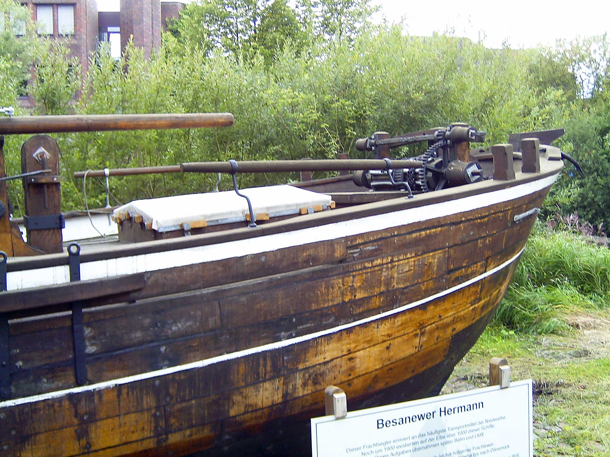 Der letzte hoelzerne Frachtewer am alten Standort in Itzehoe, der neue Ausstellungsort wird das Hafenmuseum Hamburg sein.